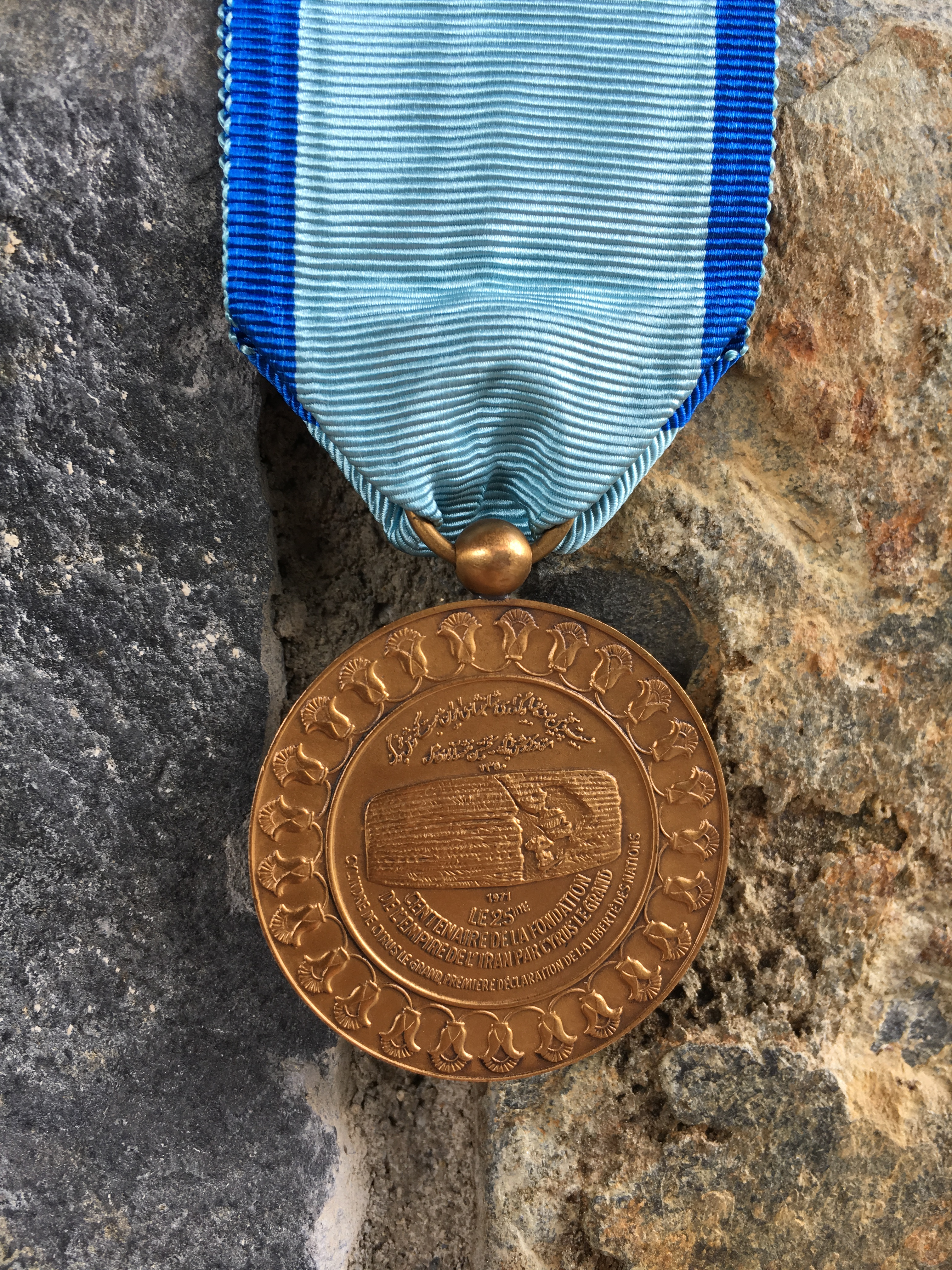 Medalla 2500 aniversario del Imperio Persa, reverso. Colección particular